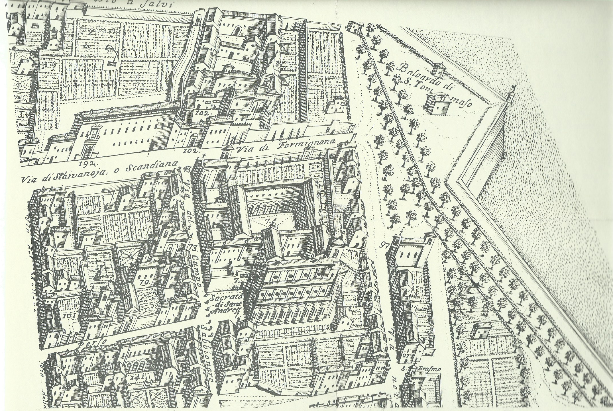 Incisione, chiesa e convento di S. Andrea